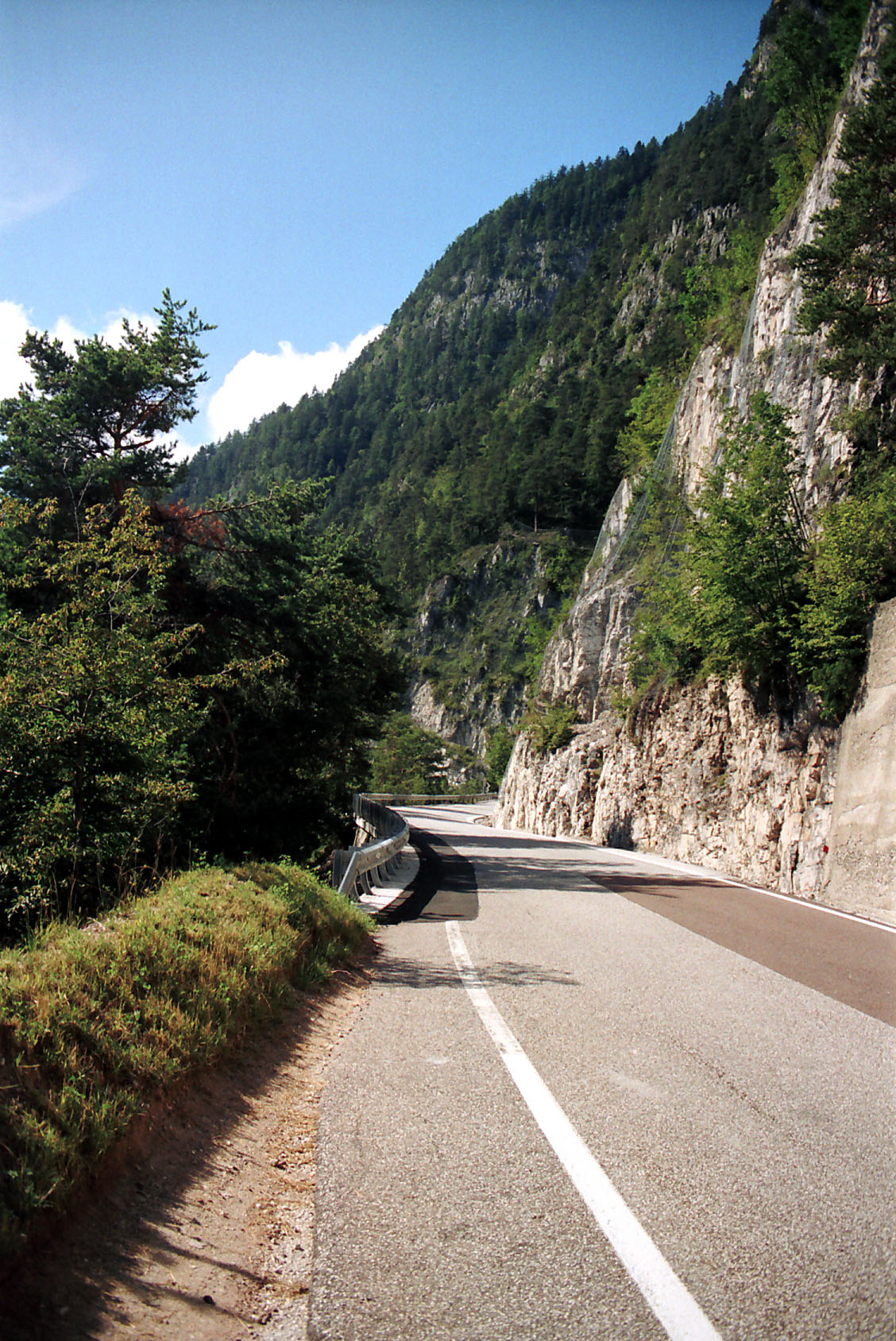 Mendelpass - Passstraße der Ostrampe